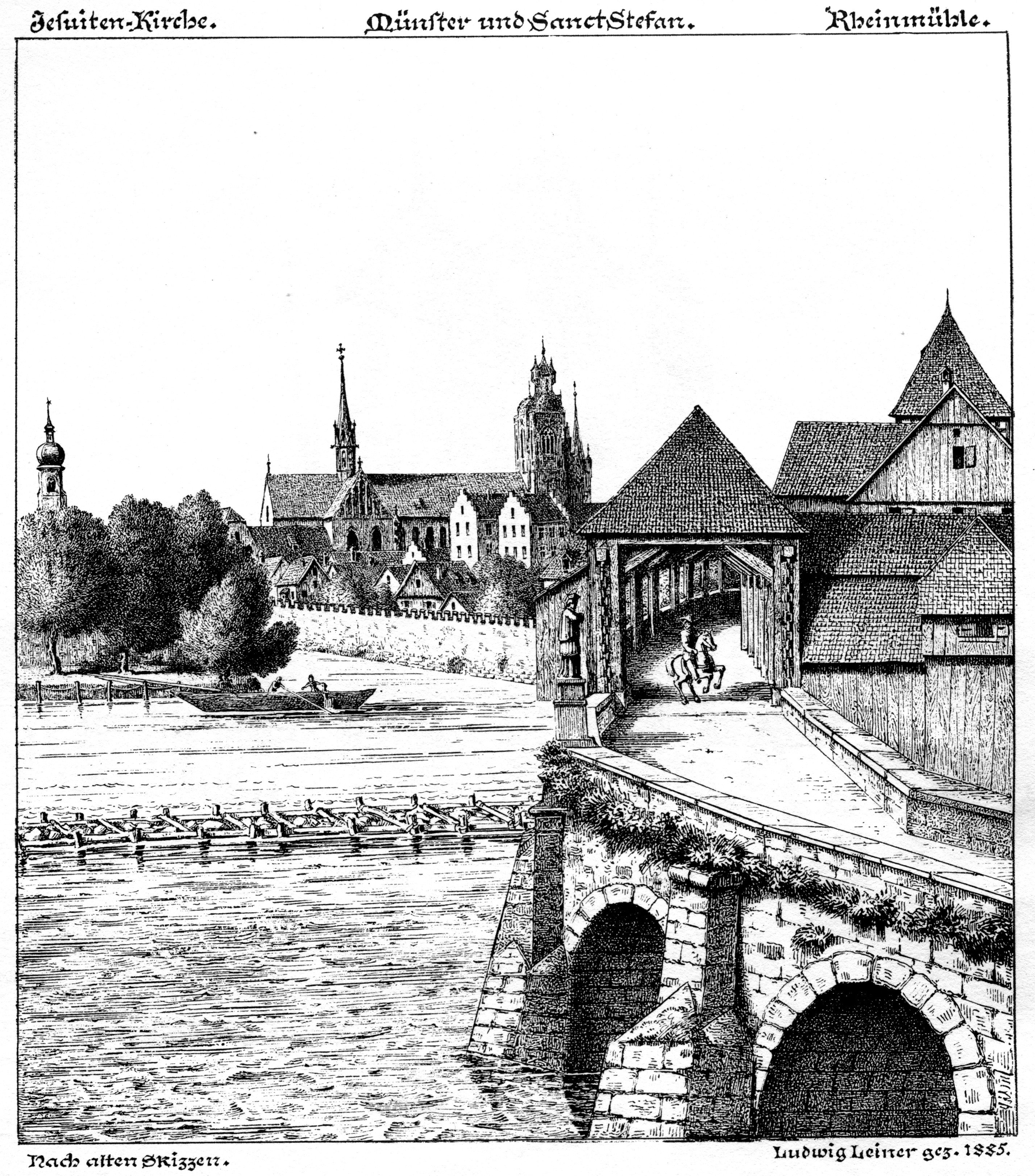 Ludwig Leiner (1830-1901): Konstanz, Alte Rheinbrücke